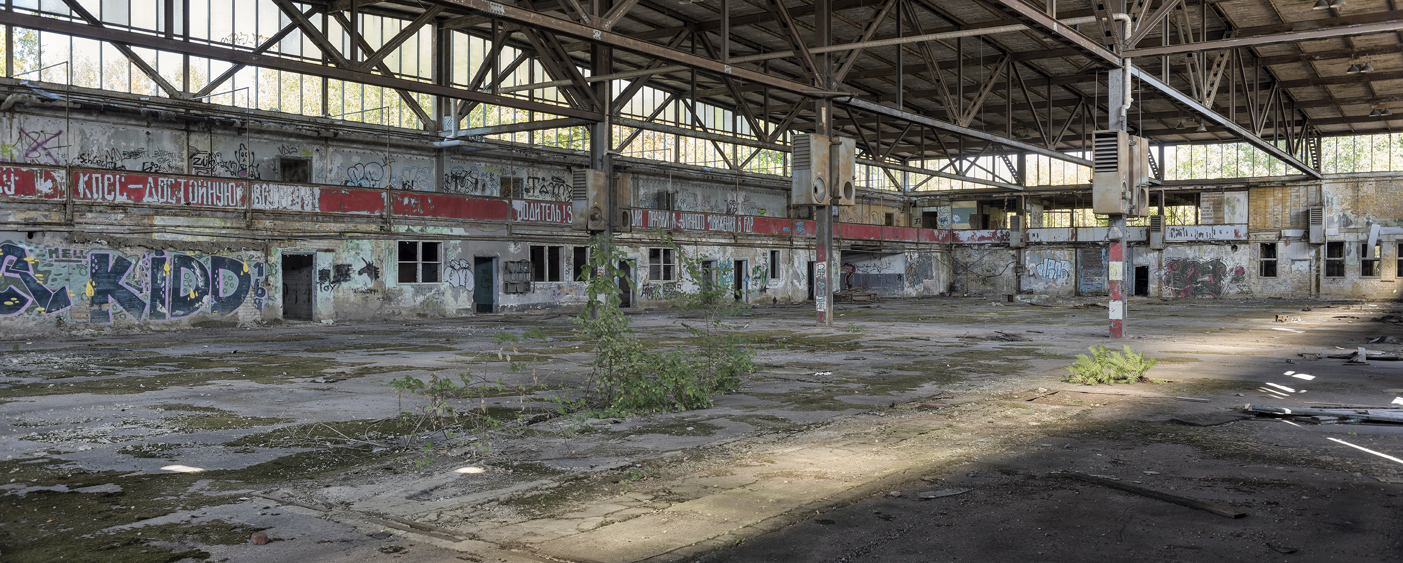 Flugplatz Rangsdorf, Innenansicht der ehem. Endmontagehalle gegen Nordosten.